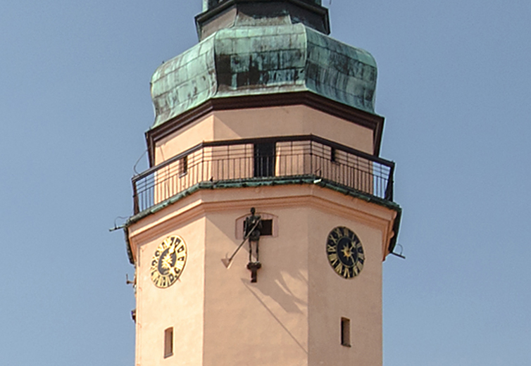 Der Tod von Ohlau (Sensenmann) am Rathaus in Ohlau/Oława in Niederschlesien